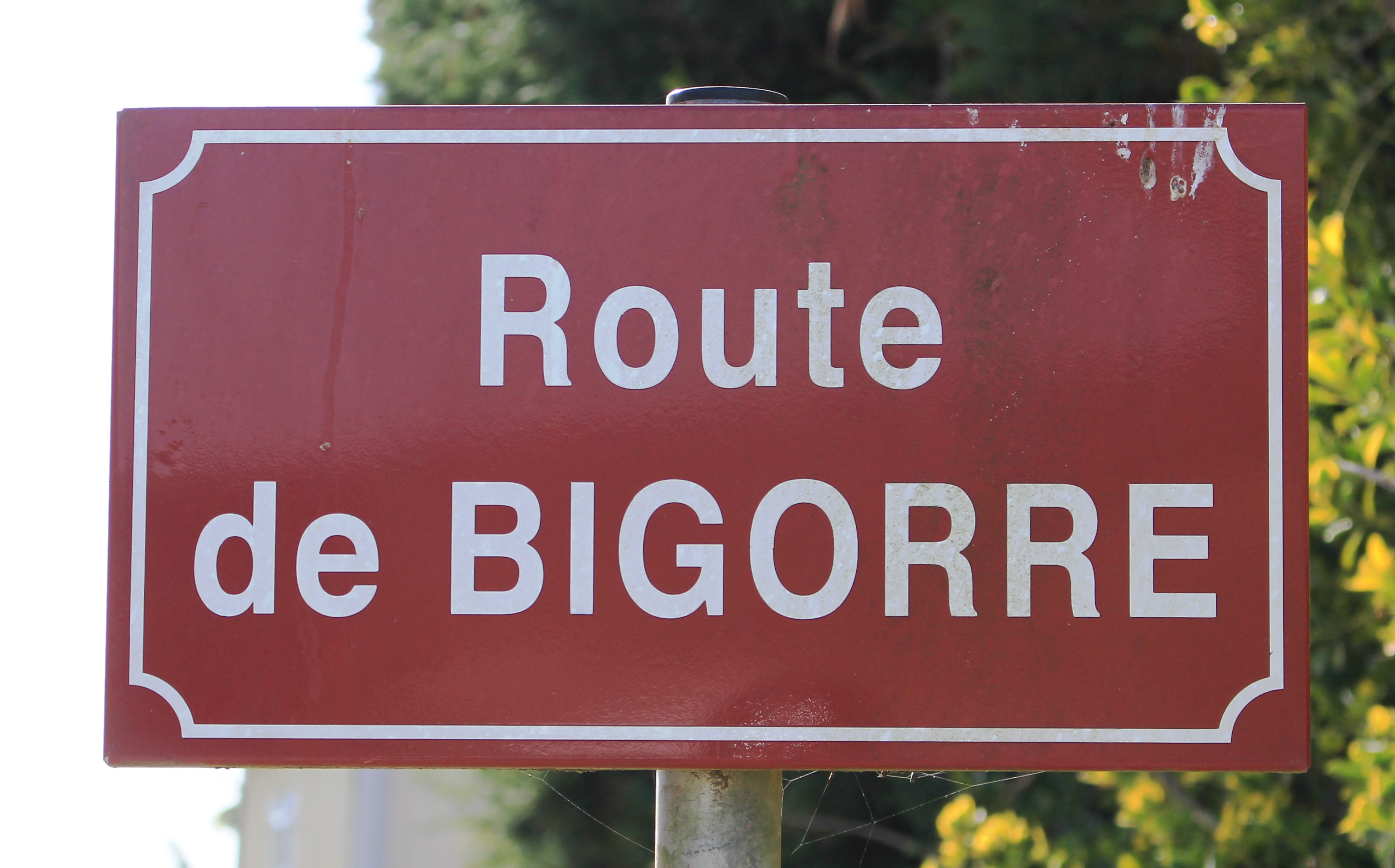 Rue du village de Moumoulous (Hautes-Pyrénées)